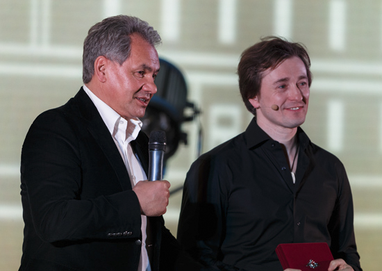 Сергей Безруков читает стихи Есенина и Высоцкого в Национальном центре управления обороной РФ